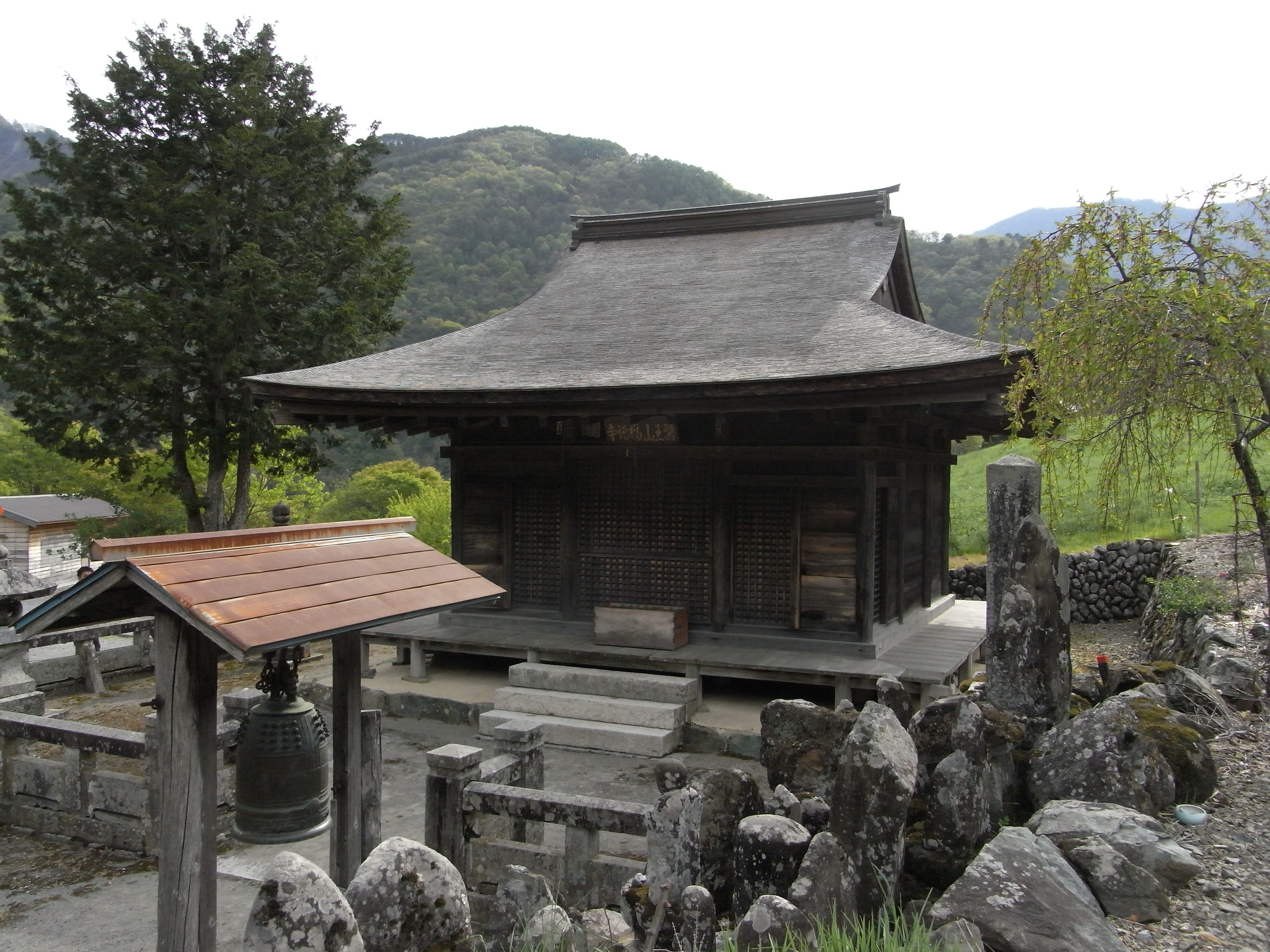 長野県下伊那郡大鹿村 福徳寺本堂